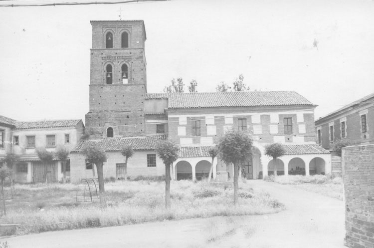 Iglesia parroquial de San Andrés - Monasterio de Vega (Valladolid) - Álbum 200 x 140 - Fotografía. Papel 120 x 80 B/N